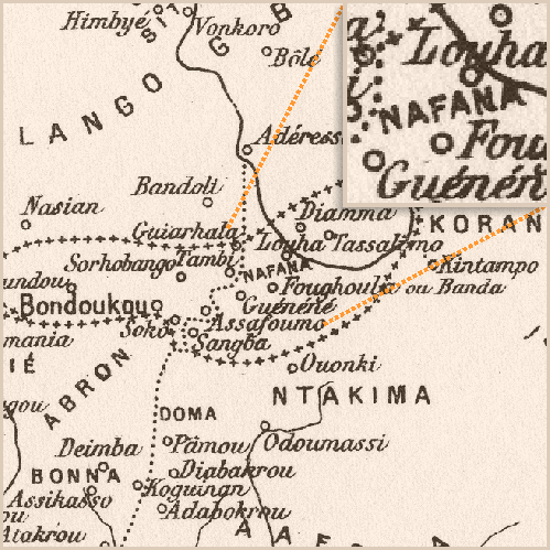 Fragment of Delafosse's 1904 linguistic map of Côte d'Ivoire and environs, highlighting Nafaanra. Delafosse, Maurice (1904) Vocabulaires comparatifs de plus de 60 langues ou dialects parlés à la Côte d' Ivoire ou dans les régions limitrophes (avec des notes linguistiques et ethnologiques, une bibliographie et une carte). Paris: Leroux.